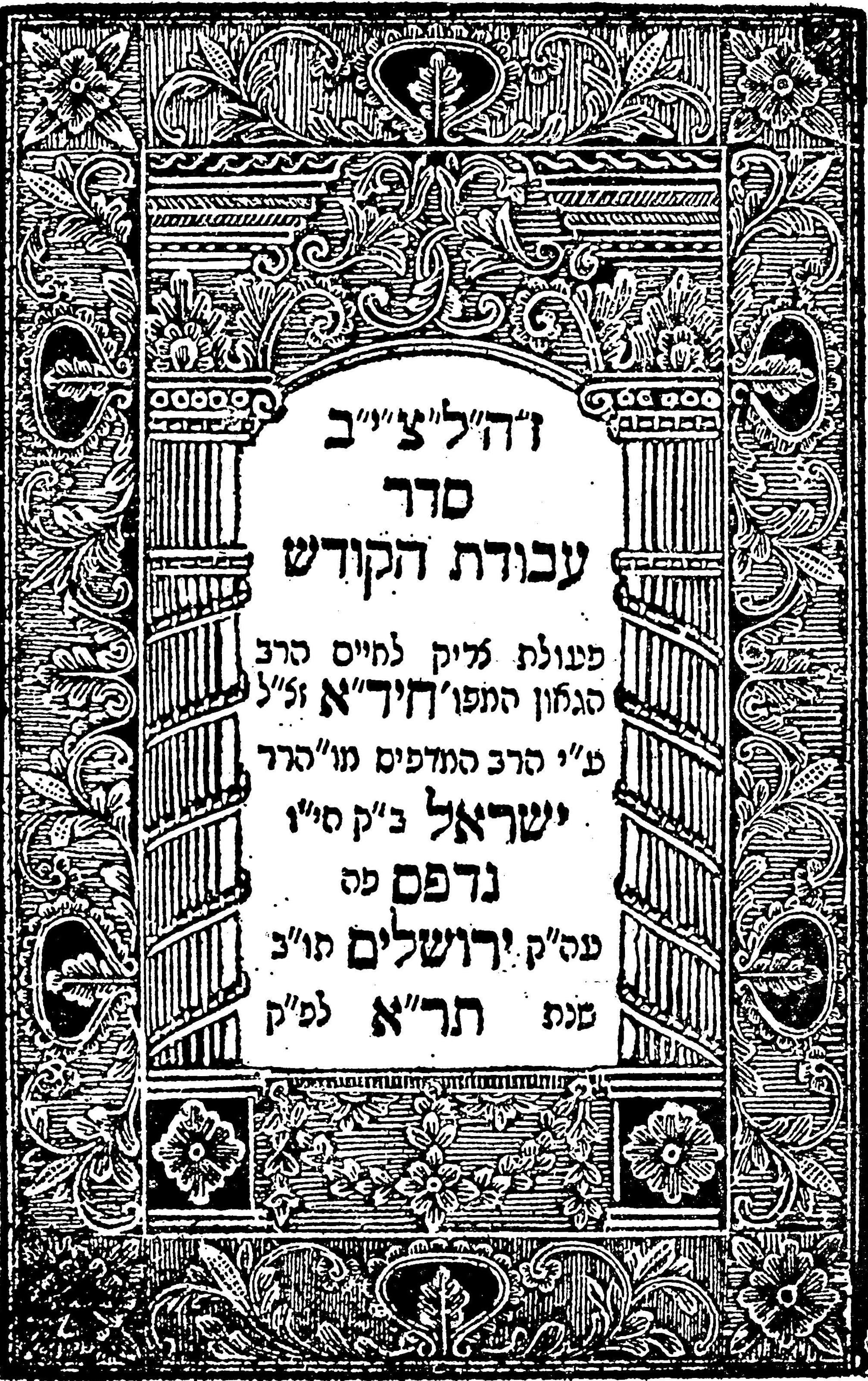 עמוד מתוך "עבודת הקודש" מאת הרב חיד"א, ירושלים, תר"א (1841)